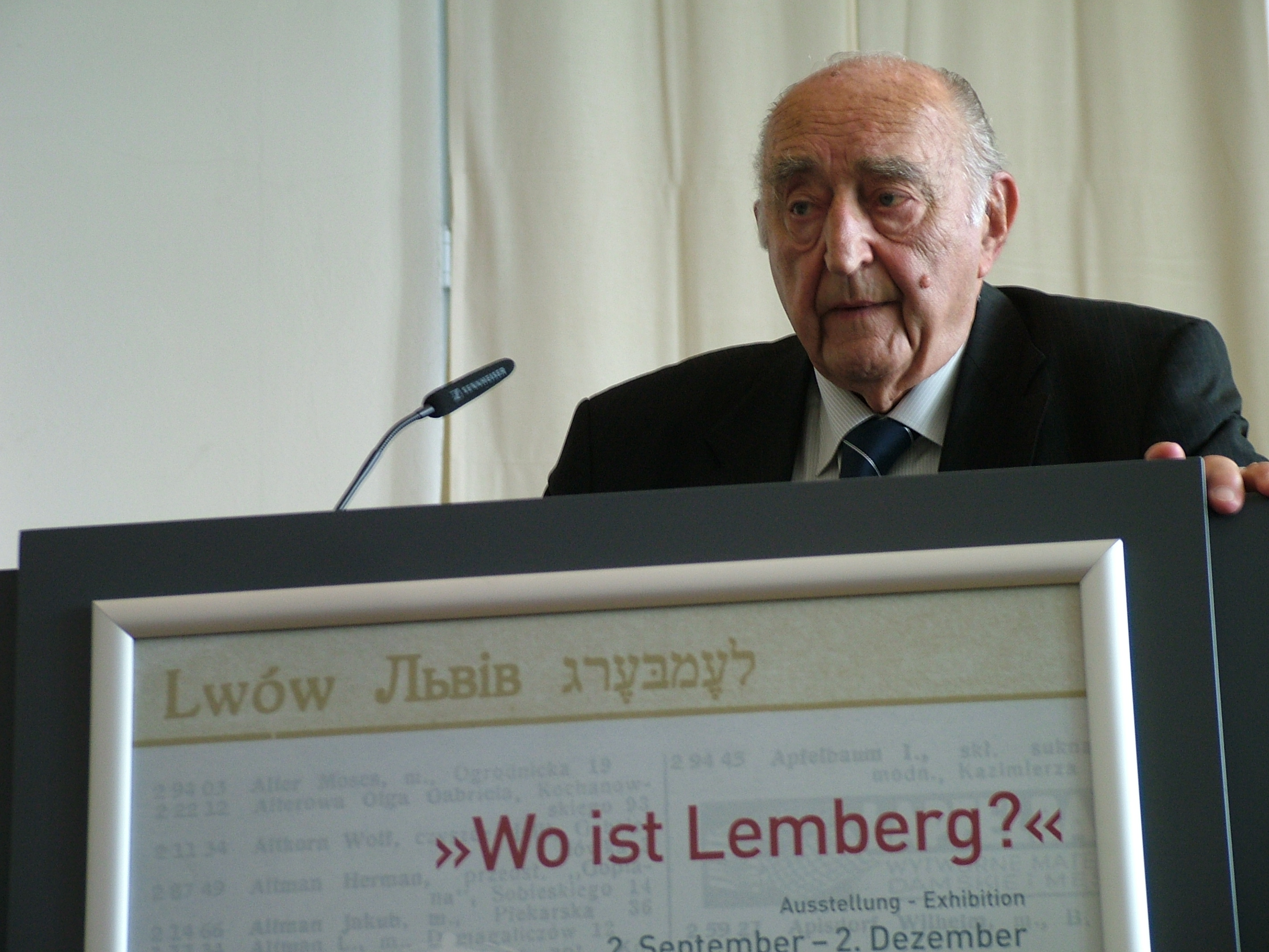 Leopold Unger przemawiający podczas otwarcia wystawy "Wo ist Lemberg" w berlińskiej synagodze.